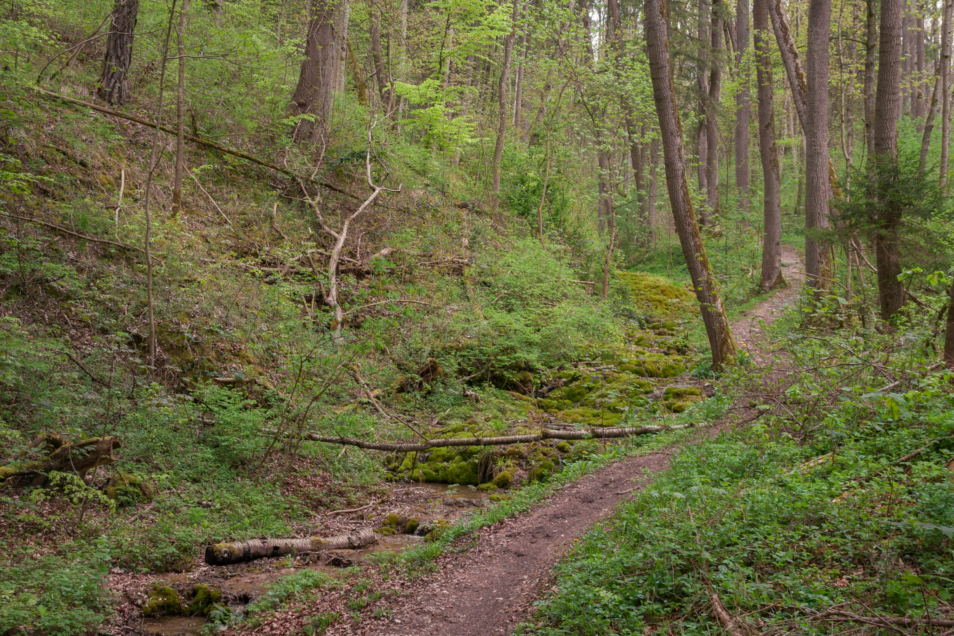 Rachental, Geotop 373R021, Landschaftsschutzgebiet innerhalb des Naturparks Altmühltal, Naturpark Altmühltal, Berching